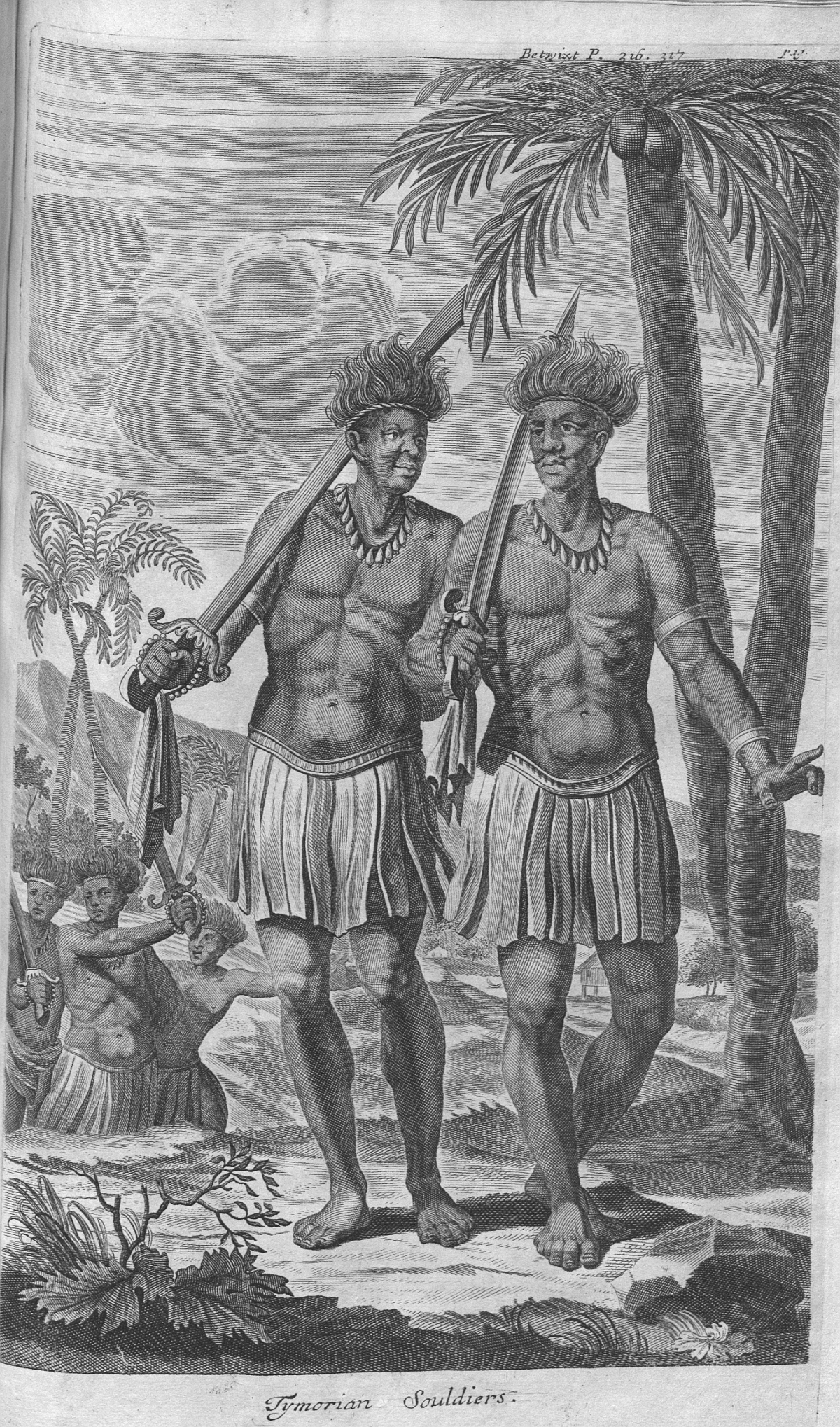 Timoresische Krieger Mitte des 17. Jhr., von den Reisen Johannes Nieuhofs 1653 bis 1670 nach Südostasiens